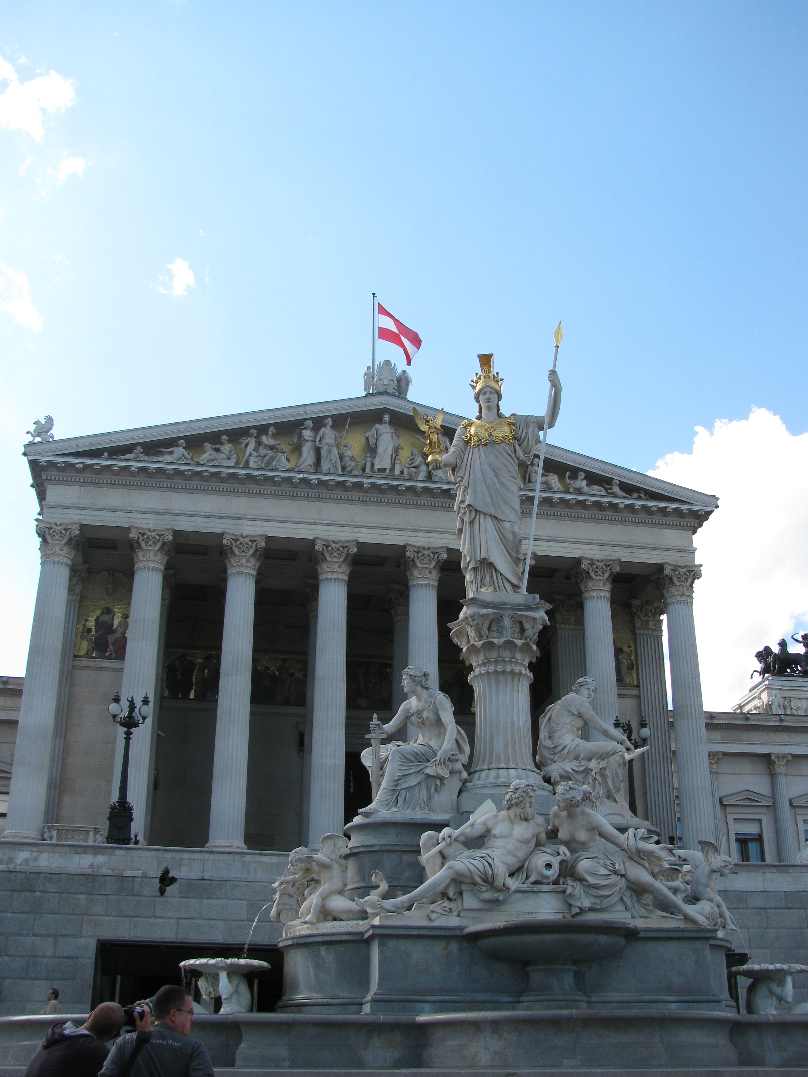 חזית בניין הפרלמנט